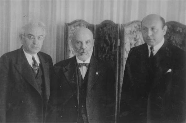 ג'ניבה - , ישראל גולדשטיין מנחם אוסישקין וסילבר בימי הקונגרס